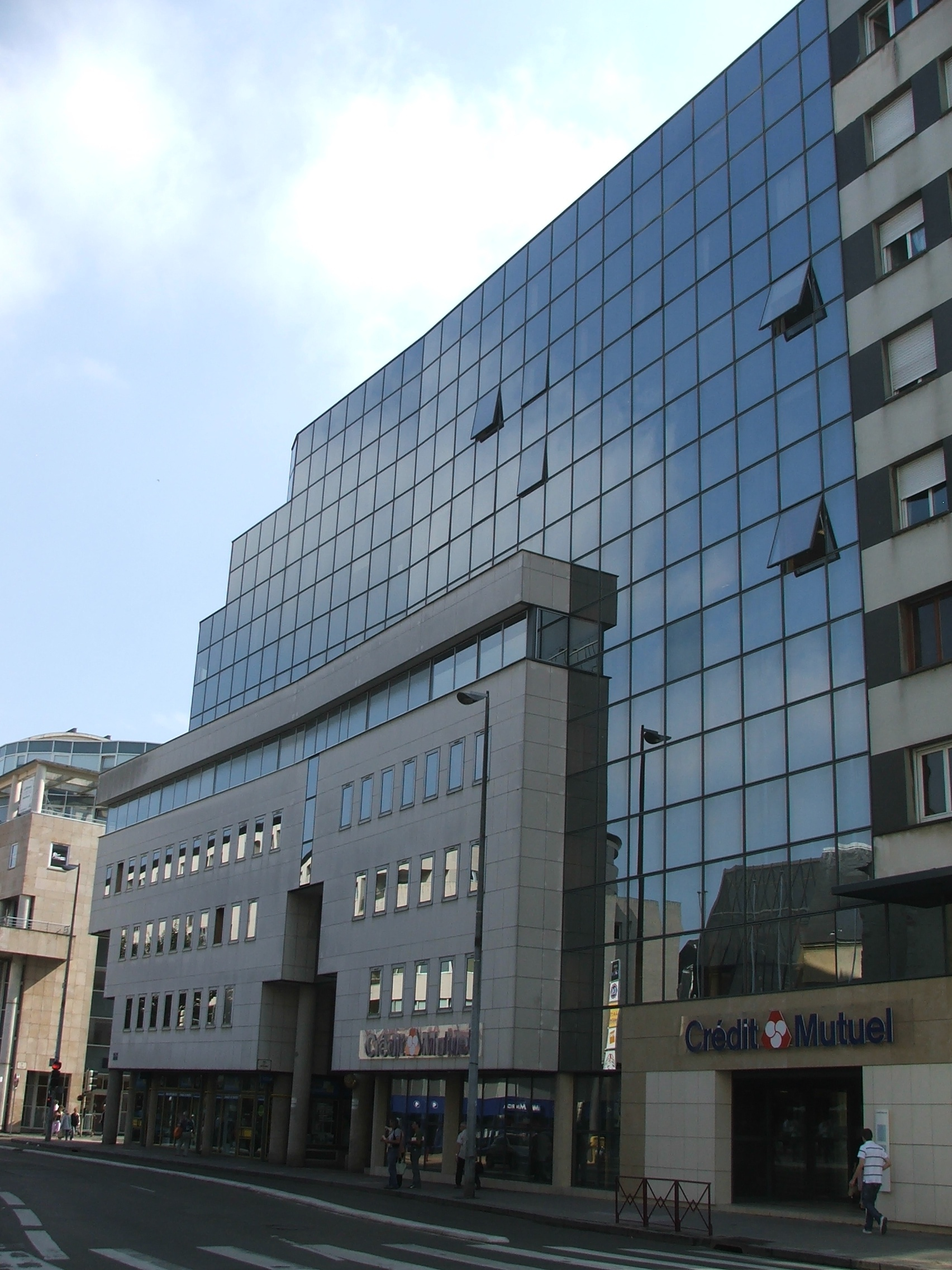 Siège du Crédit Mutuel au Mans, dans le quartier Saint-Nicolas.